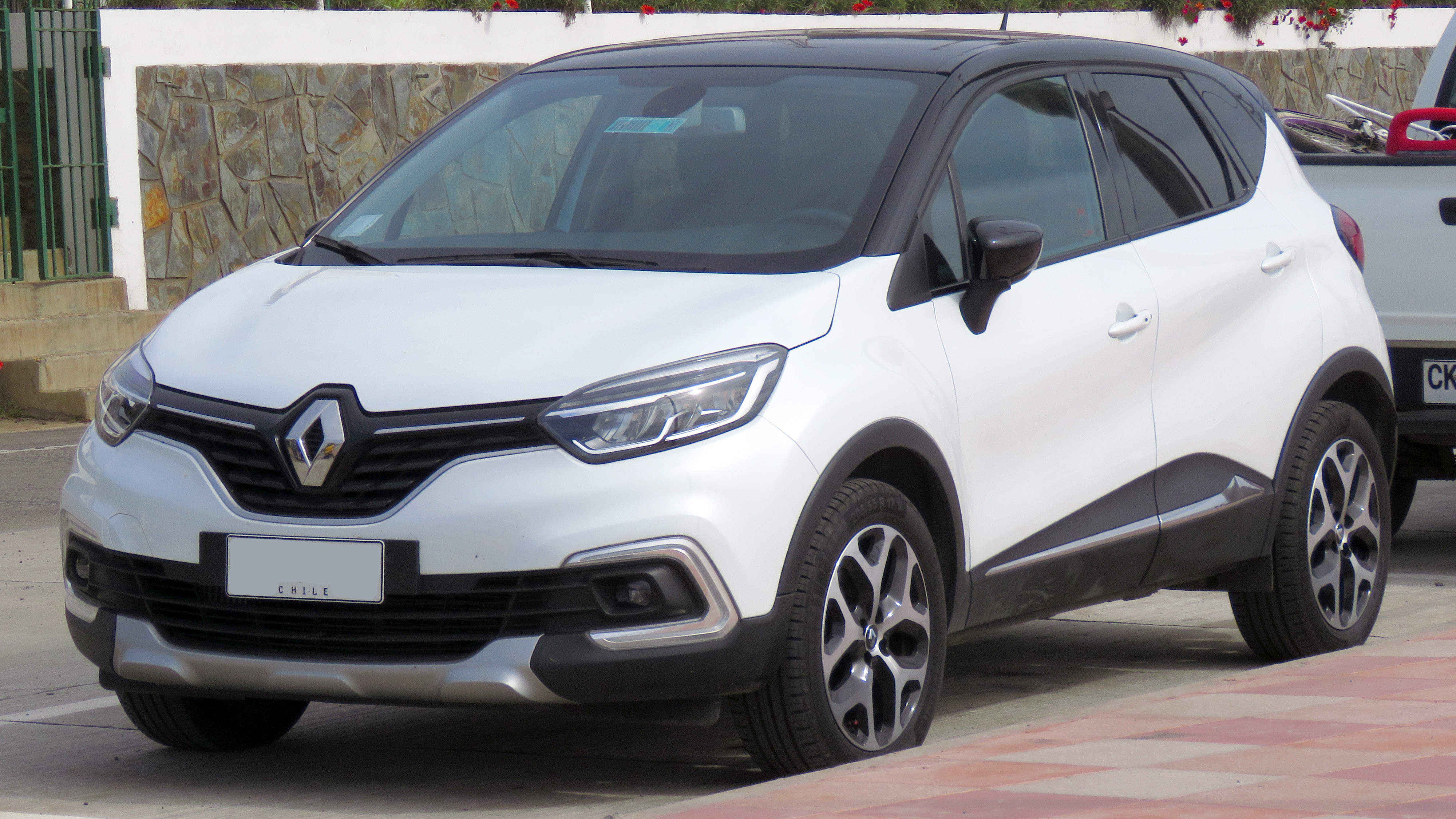 Renault Captur 1.5 dCi Zen 2018